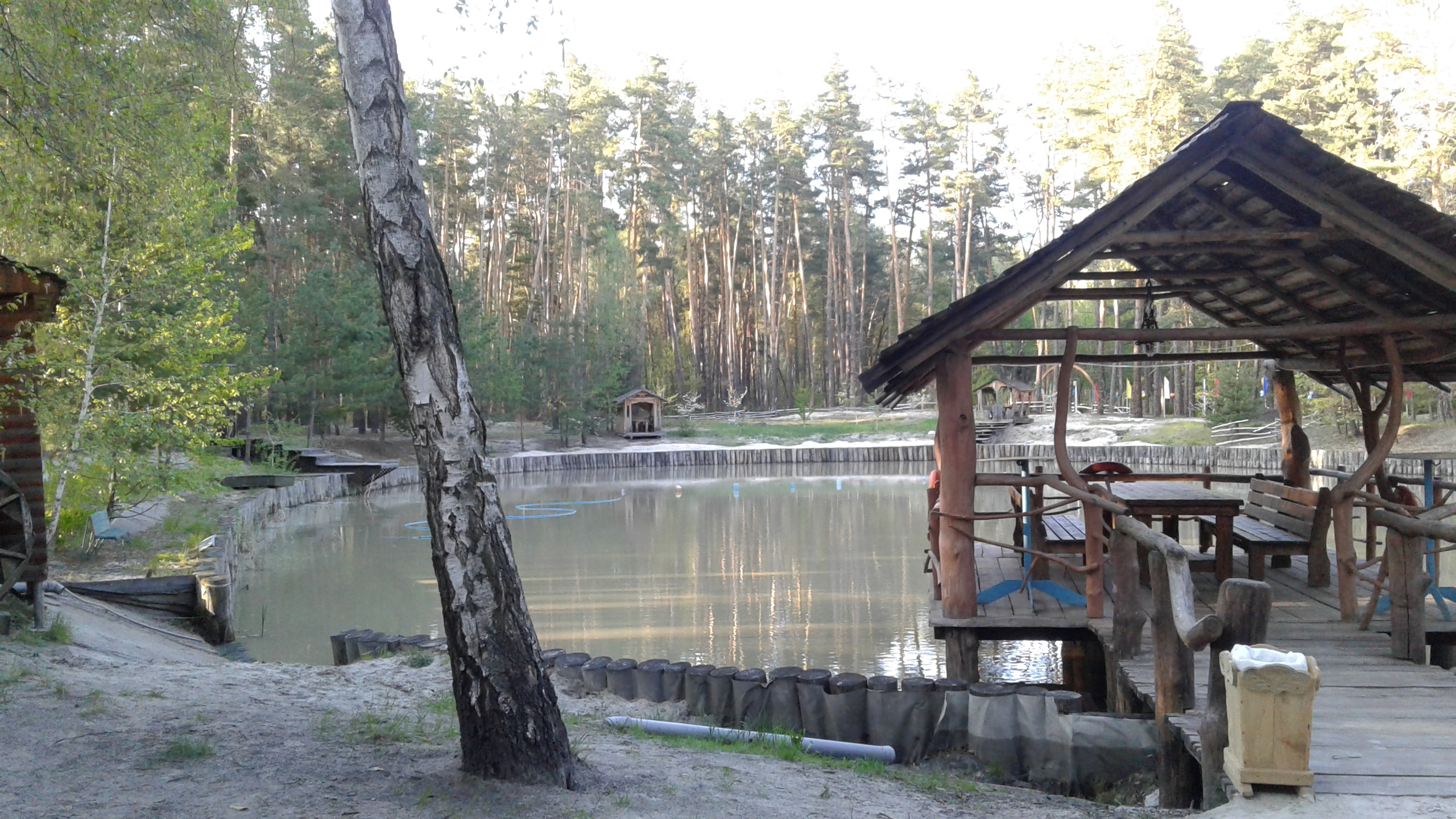 Ставок ввечері у селі Тимченки (Зміївський район).